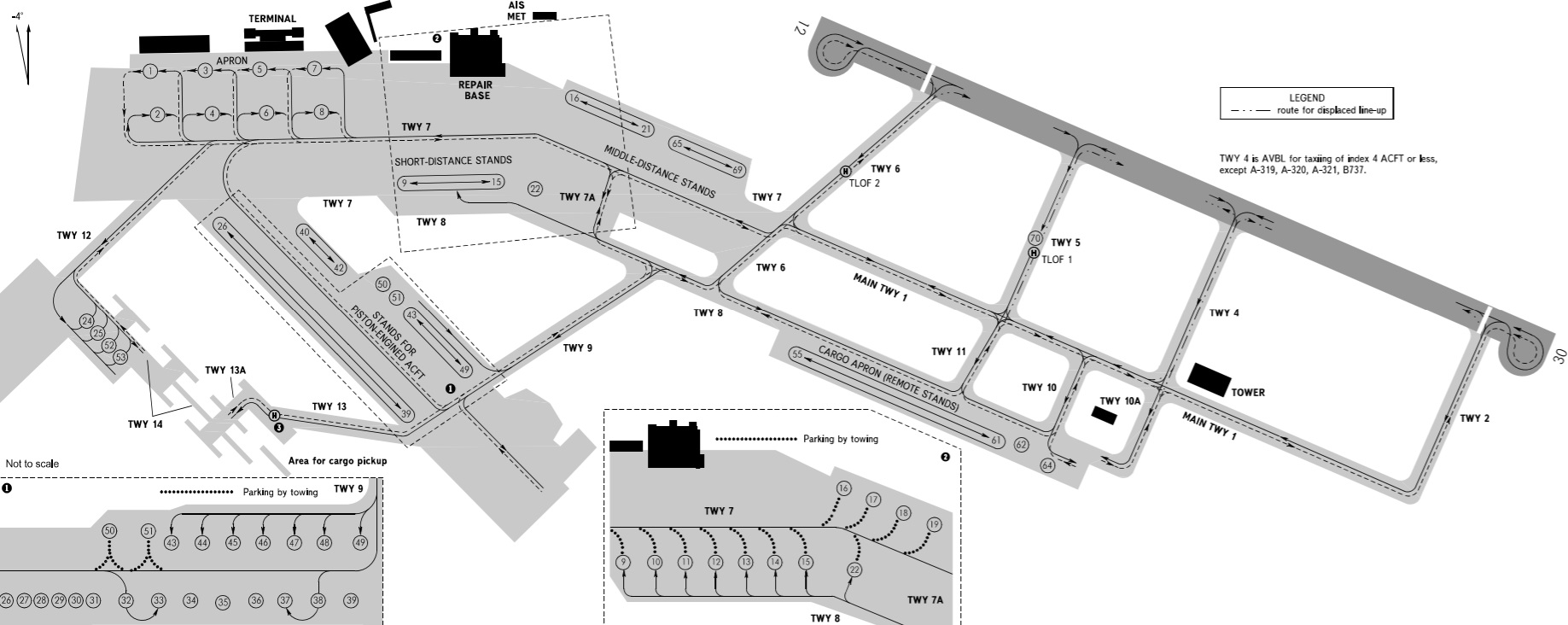 Наземное движение и схема стоянок воздушных судов на аэродроме Иркутск